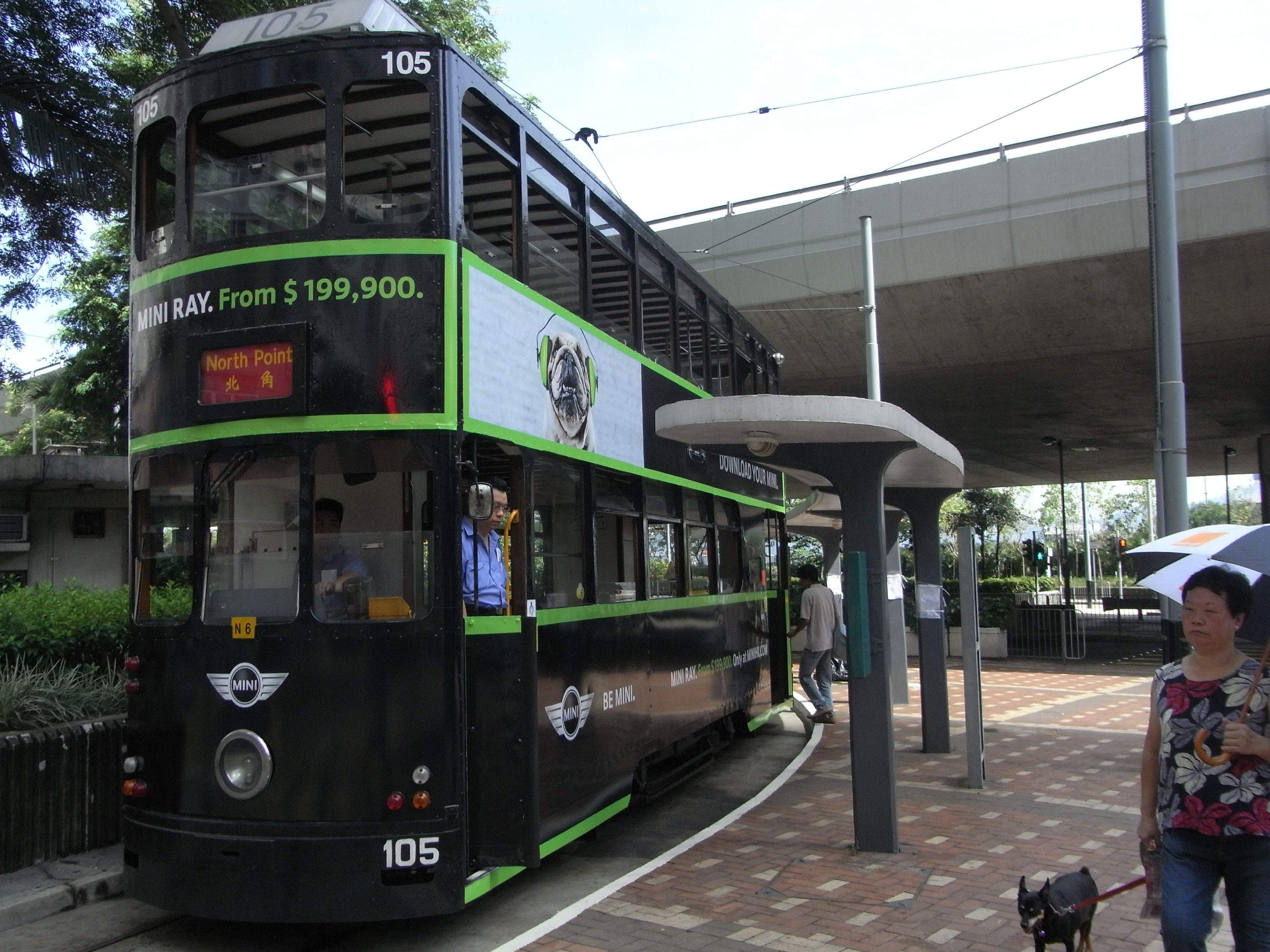 香港德輔道西，屈地街電車總站